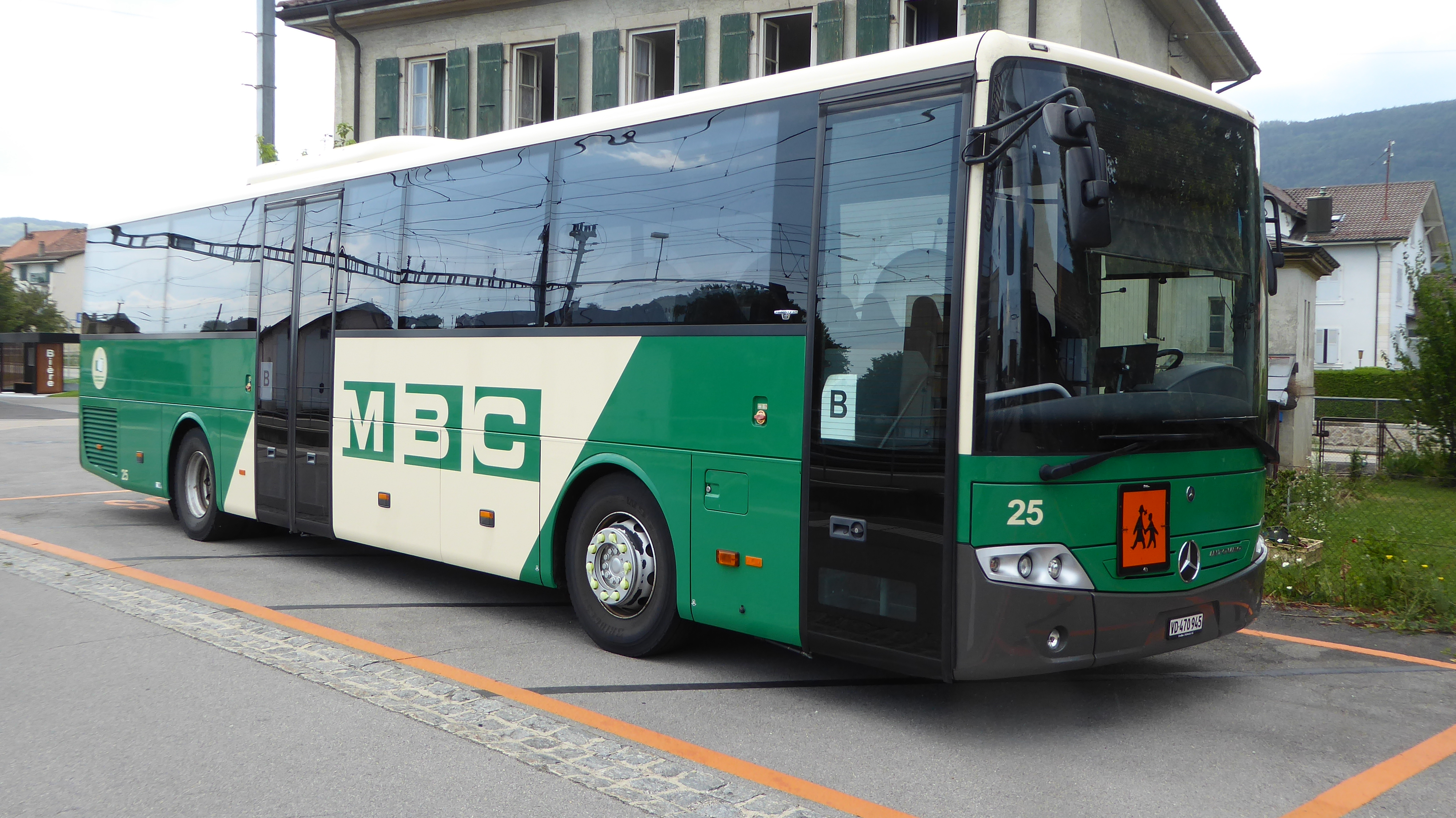 MBC-Bus Mercedes-Benz Intouro mit Kontrollschild VD 470945